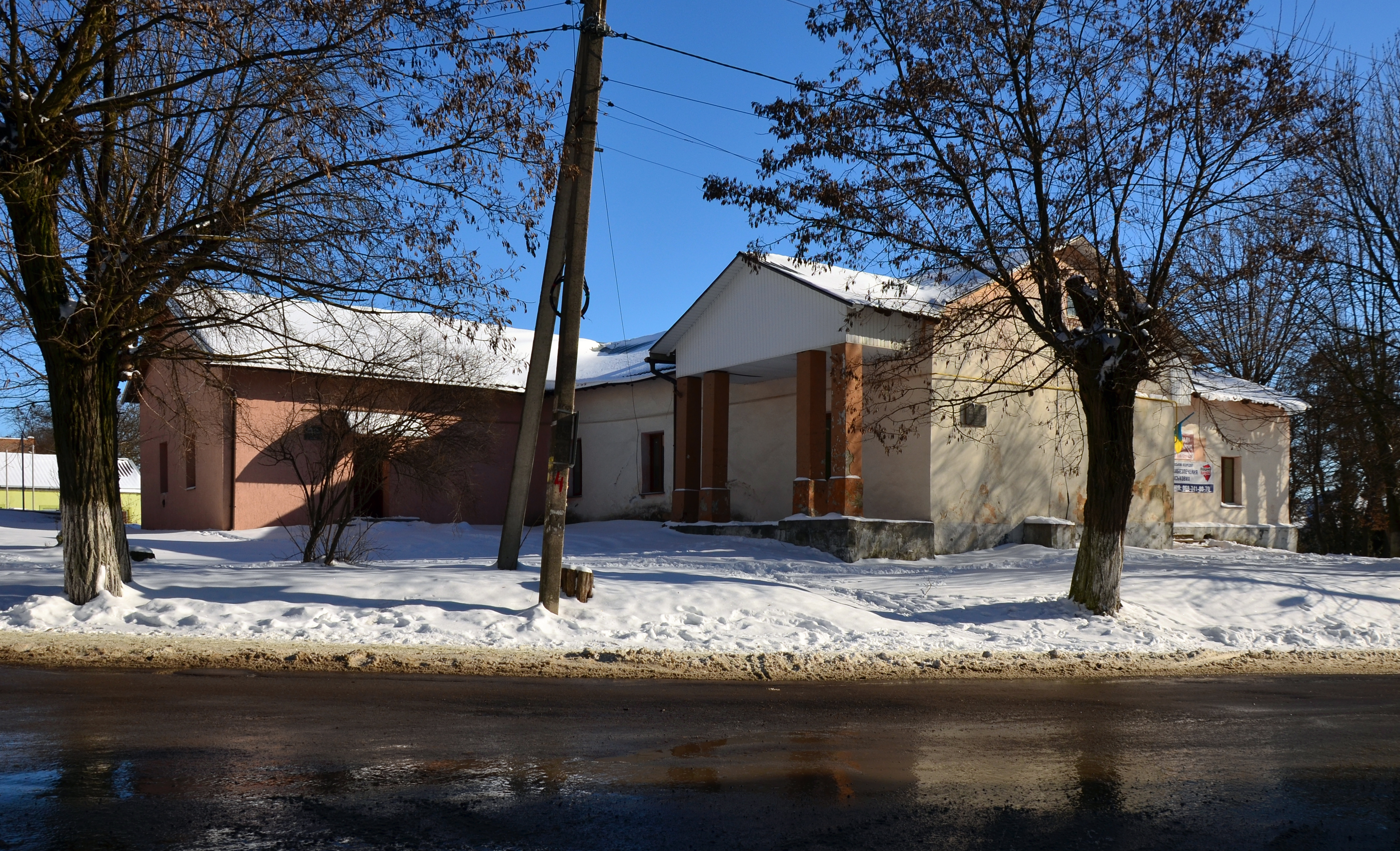 Будинок № 5 на вулиці Шевченка у Винниках.